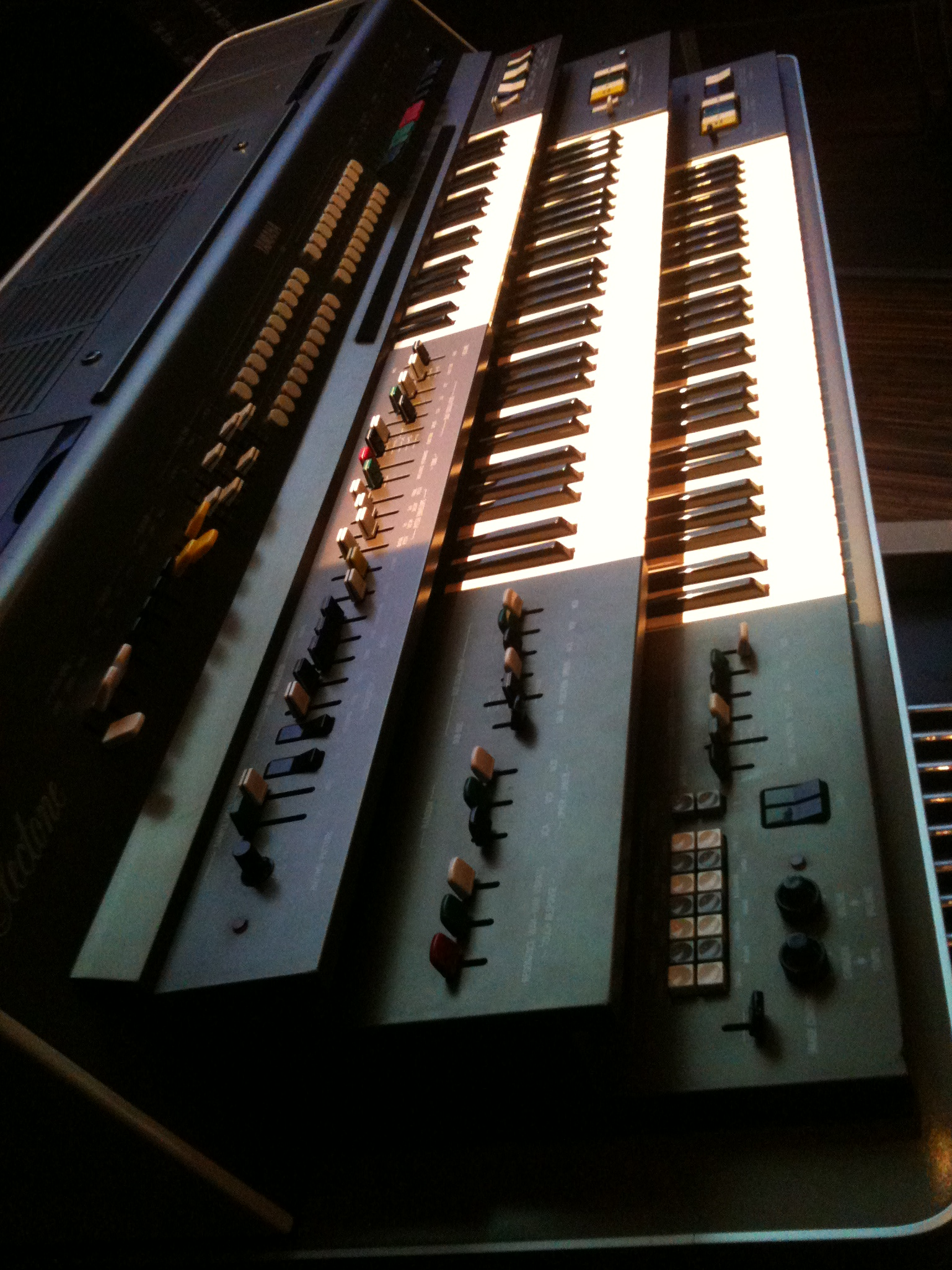 14 GX-1 manual, Yamaha Design Masterworks